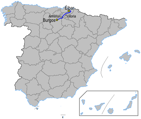 Mapa de la autopista AP1